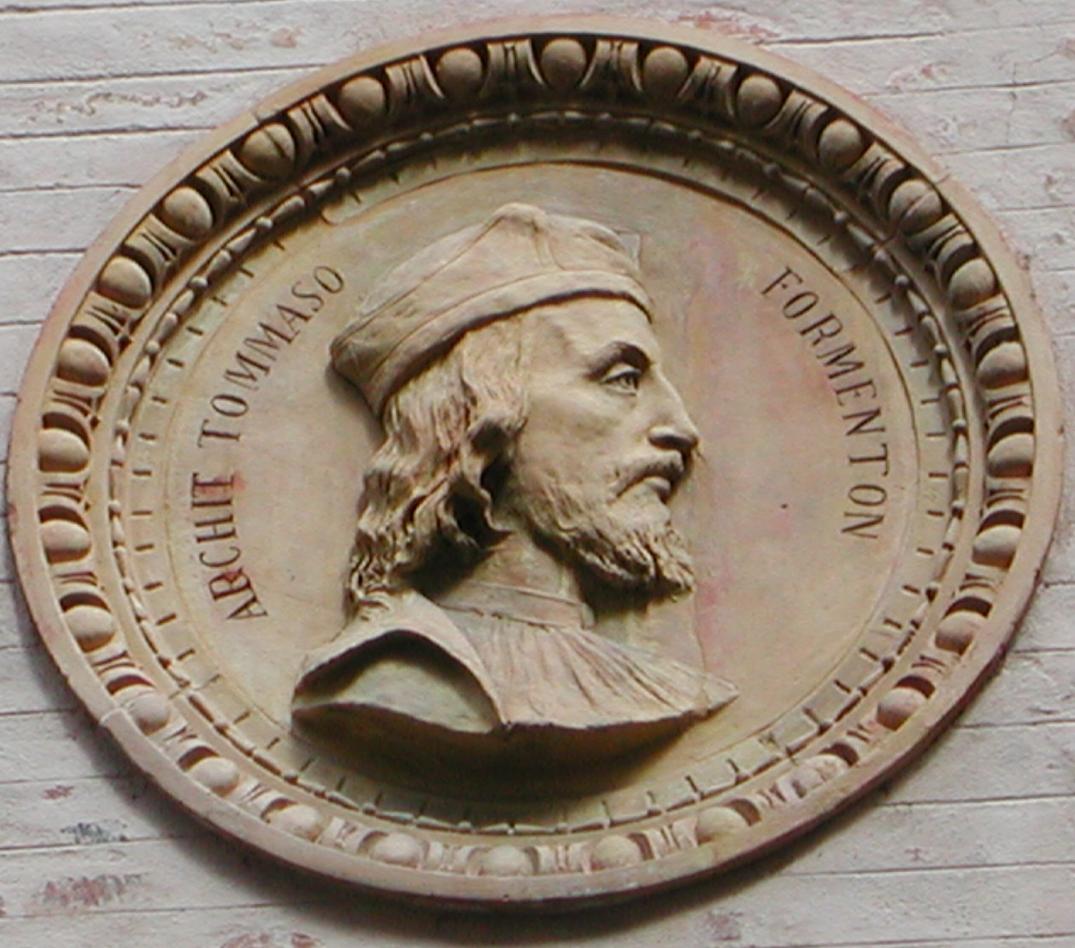 Ritratto di Tommaso Formenton (architetto italiano) al Palazzo Thiene a Vicenza